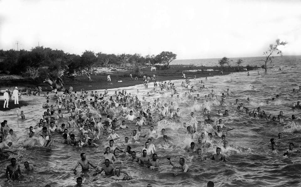 Reclusos bañándose en la playa de la Isla Martín García, Provincia de Buenos Aires, Argentina, en diciembre de 1930